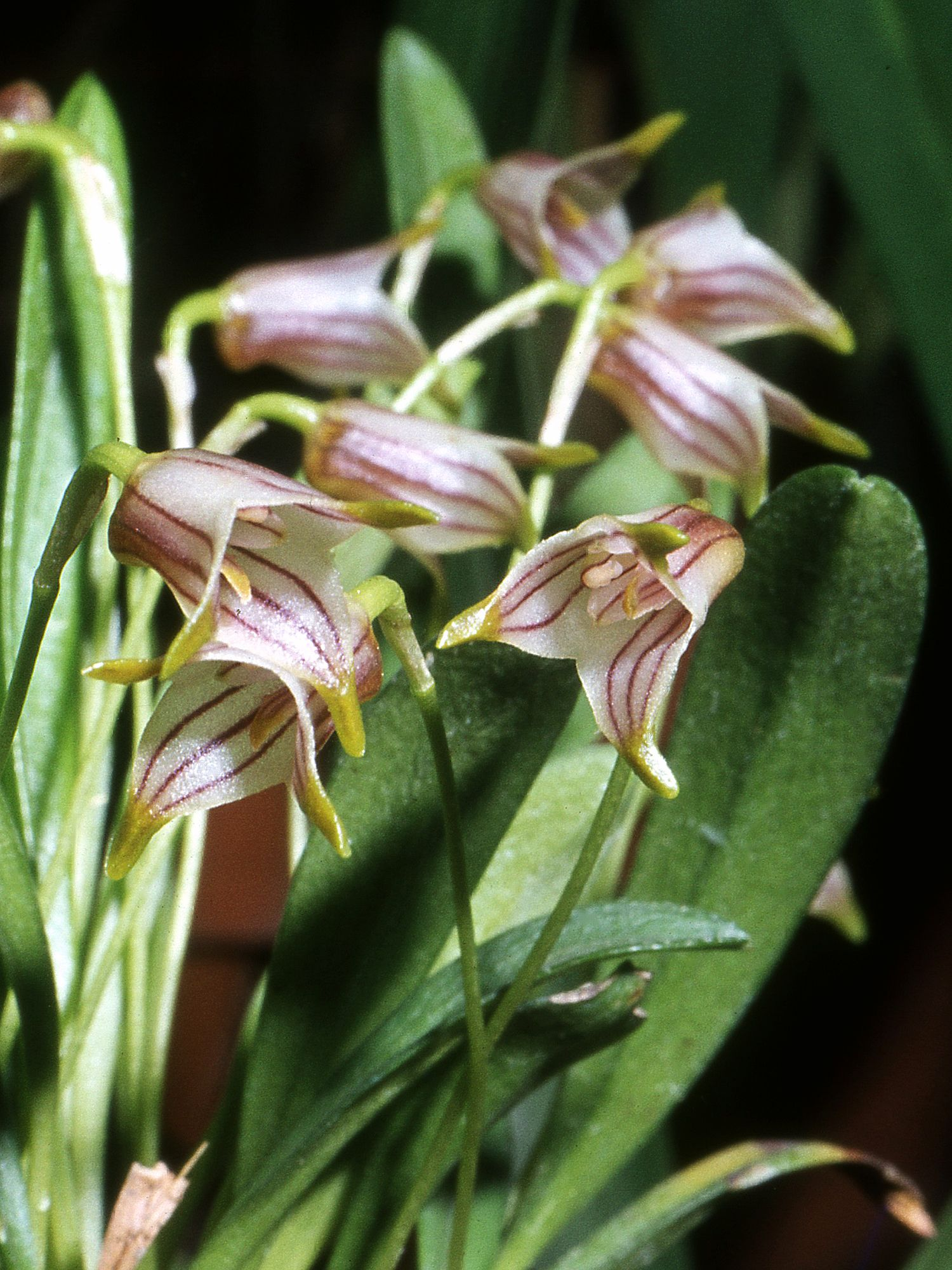 Masdevallia tubuliflora